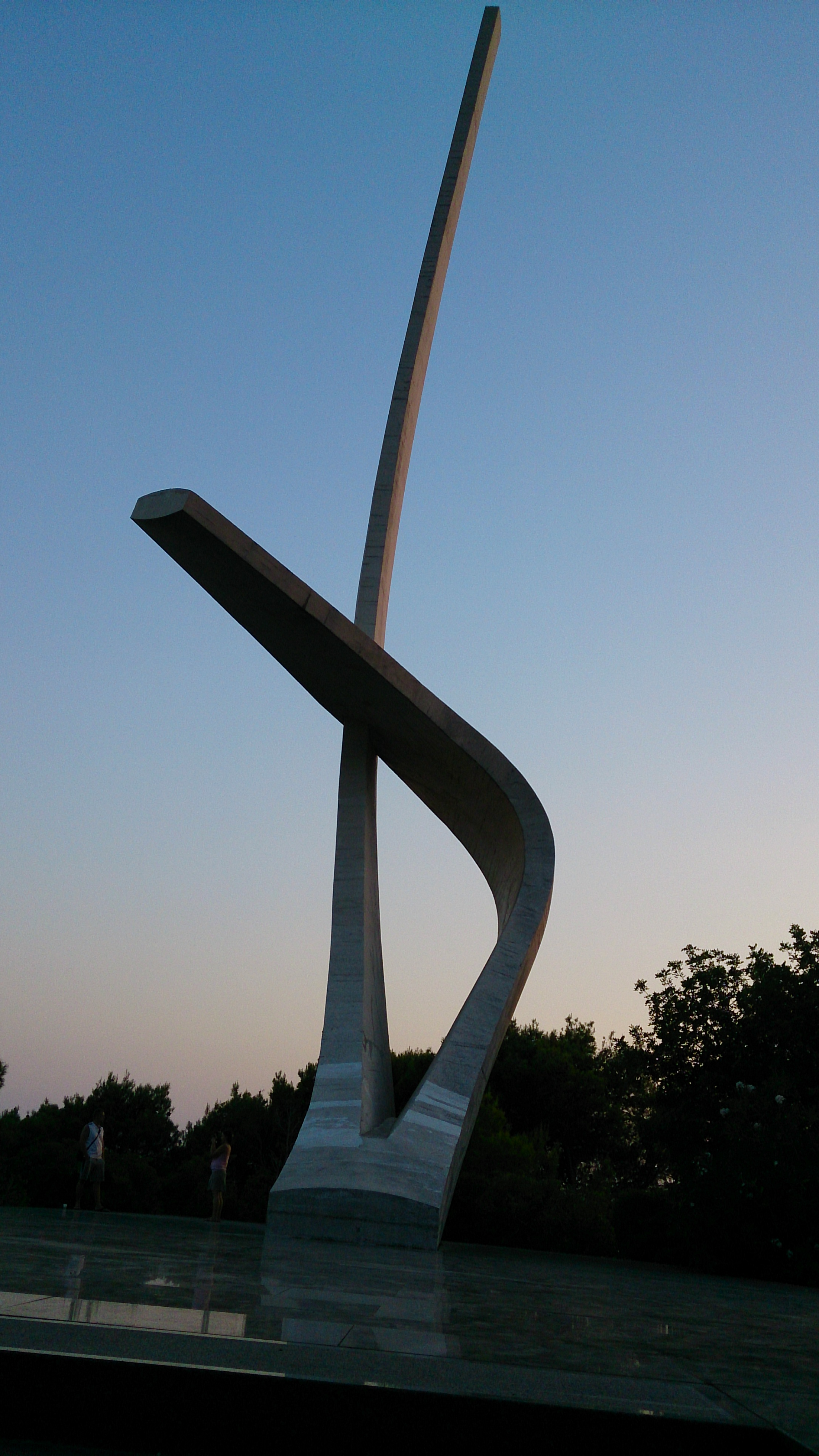 Emlékmű, Podgora